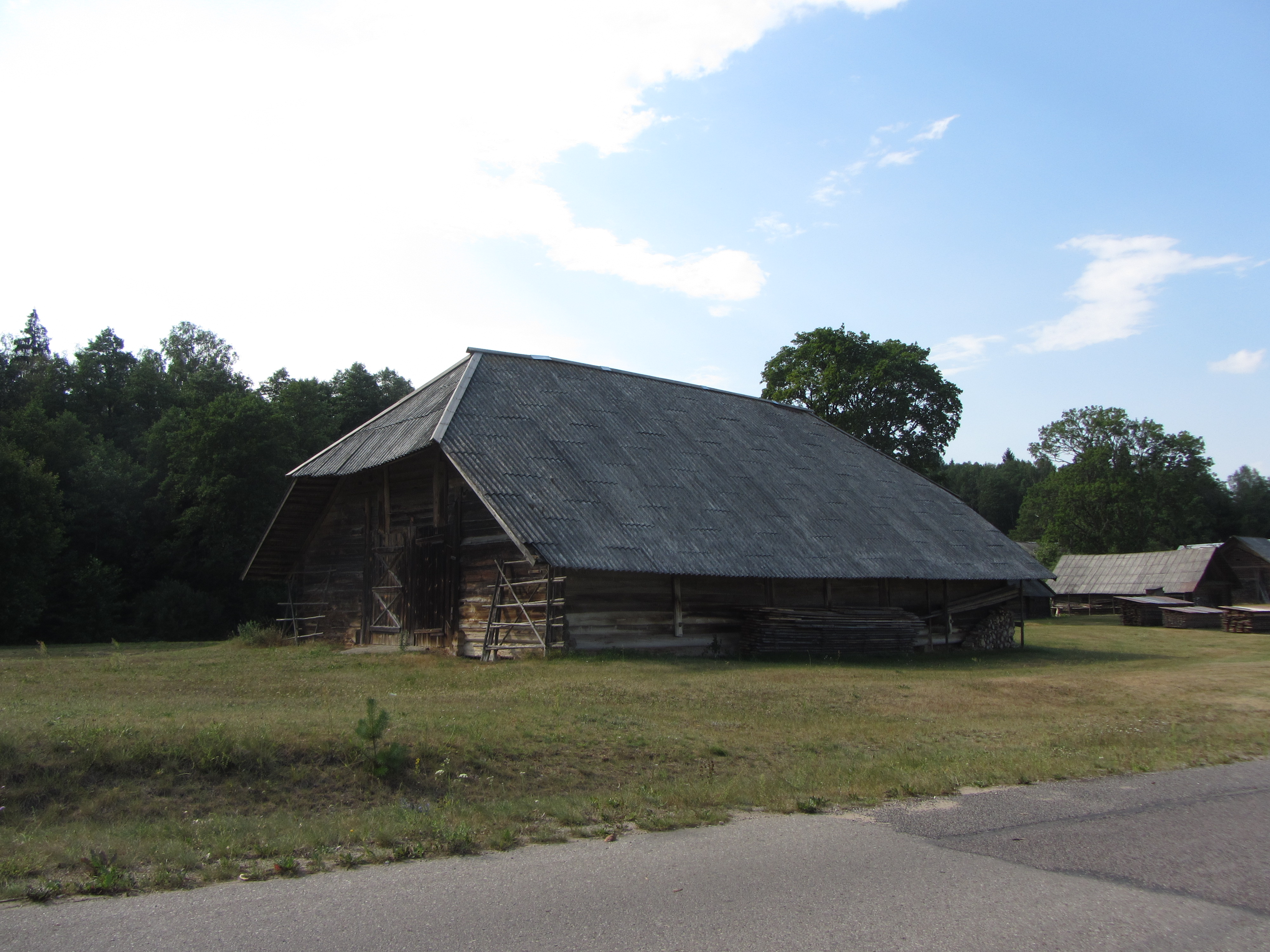 Paisetė I 28332, Lithuania